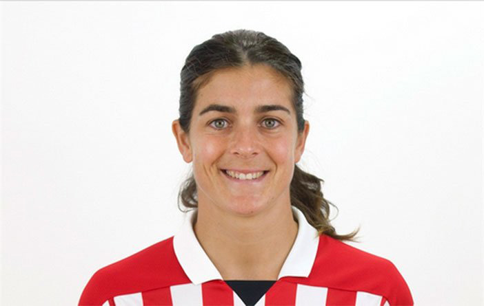 Ane Bergara. Futbolaria